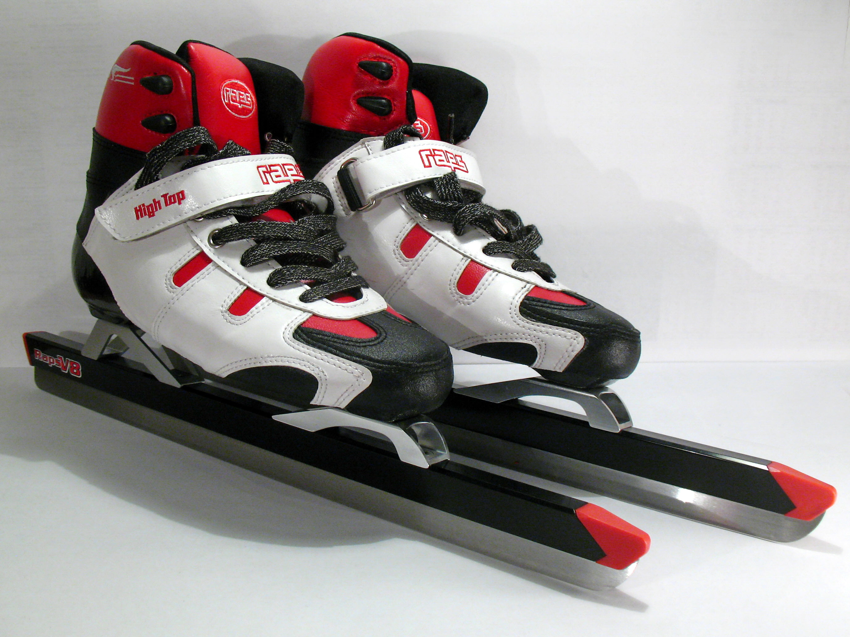 Touren-Eisschnelllaufschlittschuhe der Firma Raps